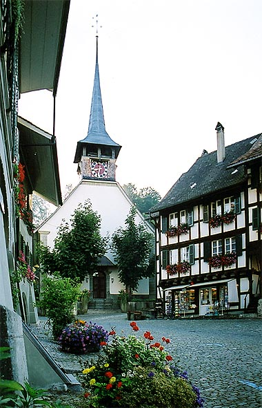 Kirche von Laupen (Marktgasse)